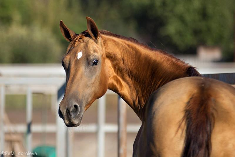 кобыла донская